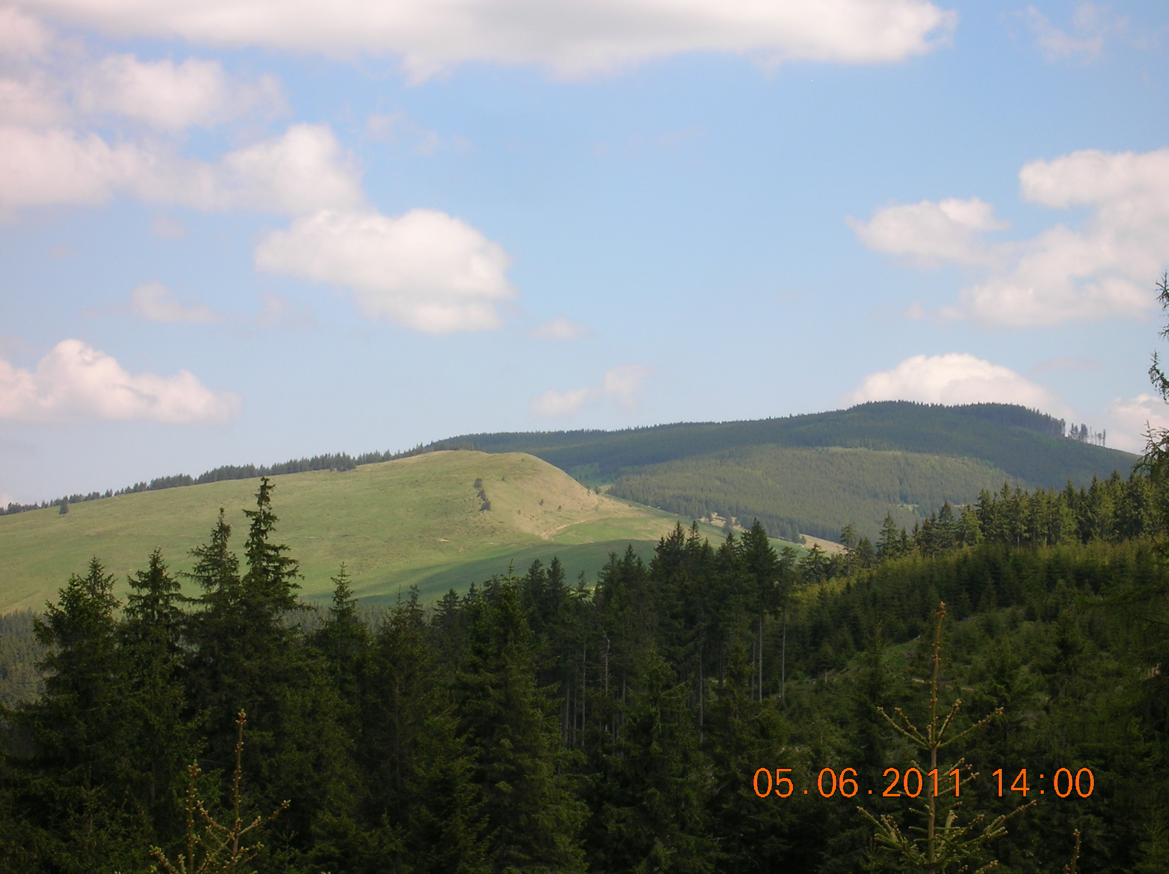 Munţii Stânişoarei (Carpaţii Orientali, România)-Vîrful Bivolul, cel mai înalt din Munţii Stînişoarei (1530 m) văzut de la aproximativ 1,5 km de Pasul Stânişoara.